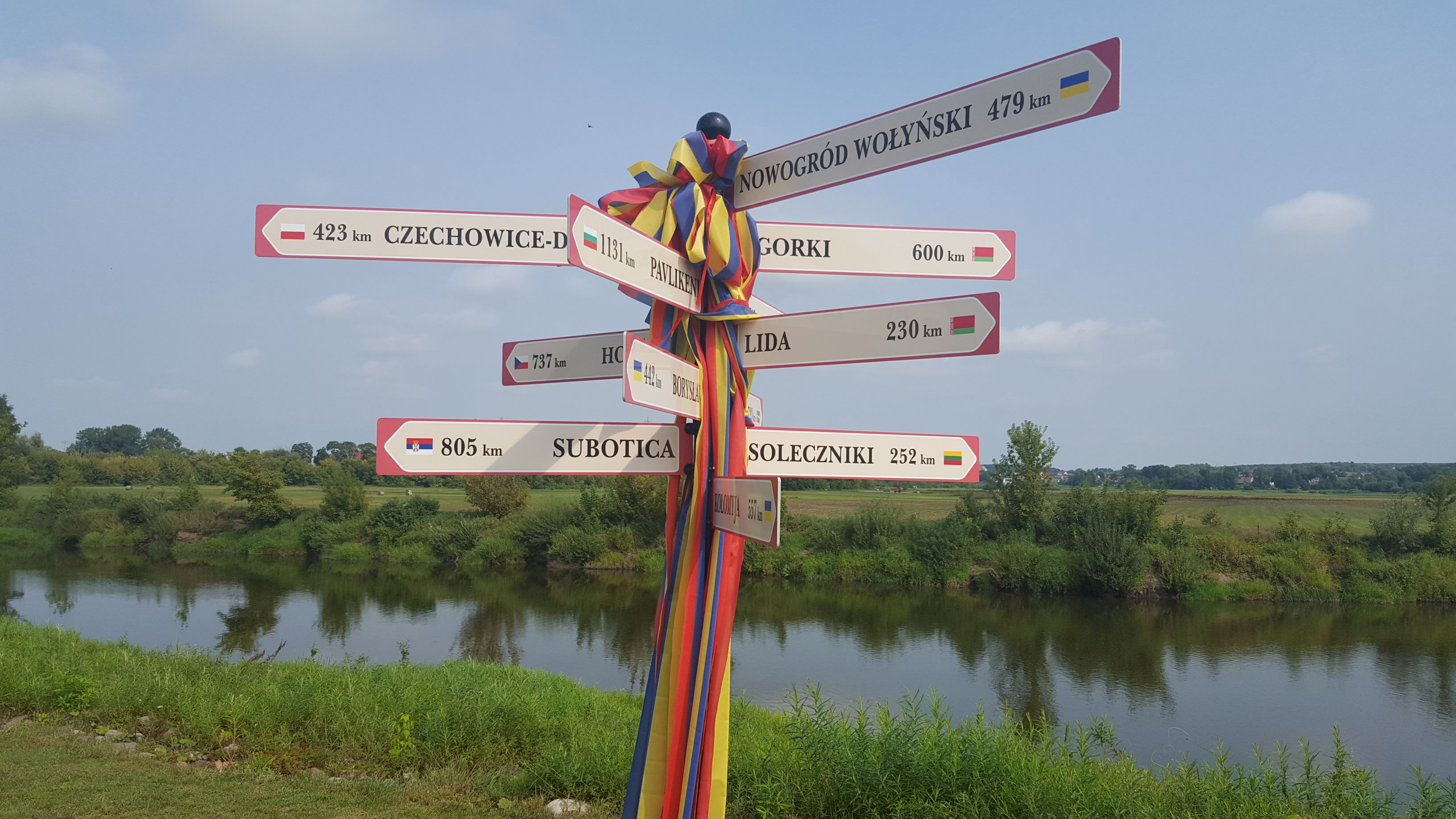 Drogowskaz w Łomży wskazujący na miasta partnerskie miasta